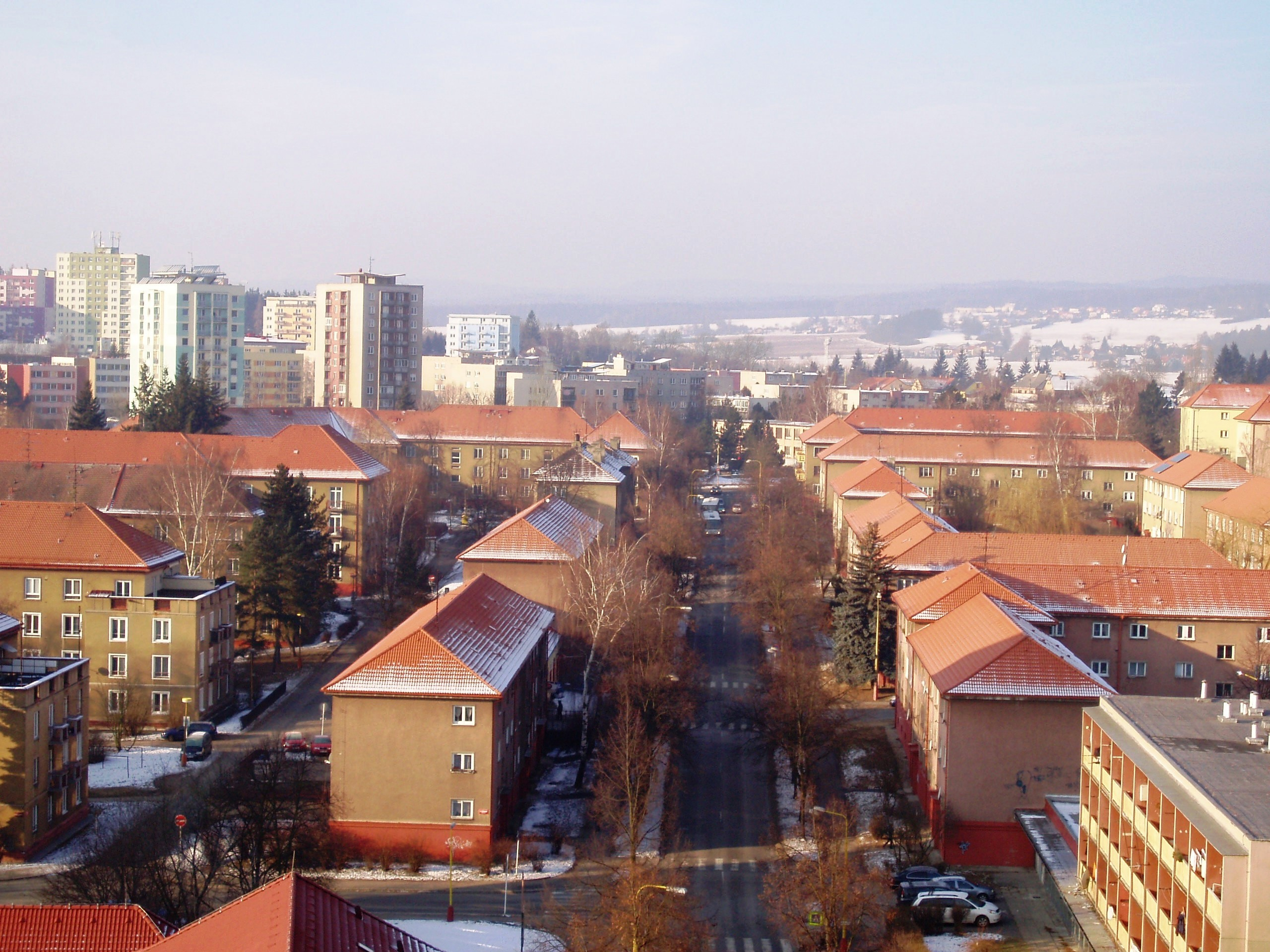 Městská část Příbram VII - hlavní třída